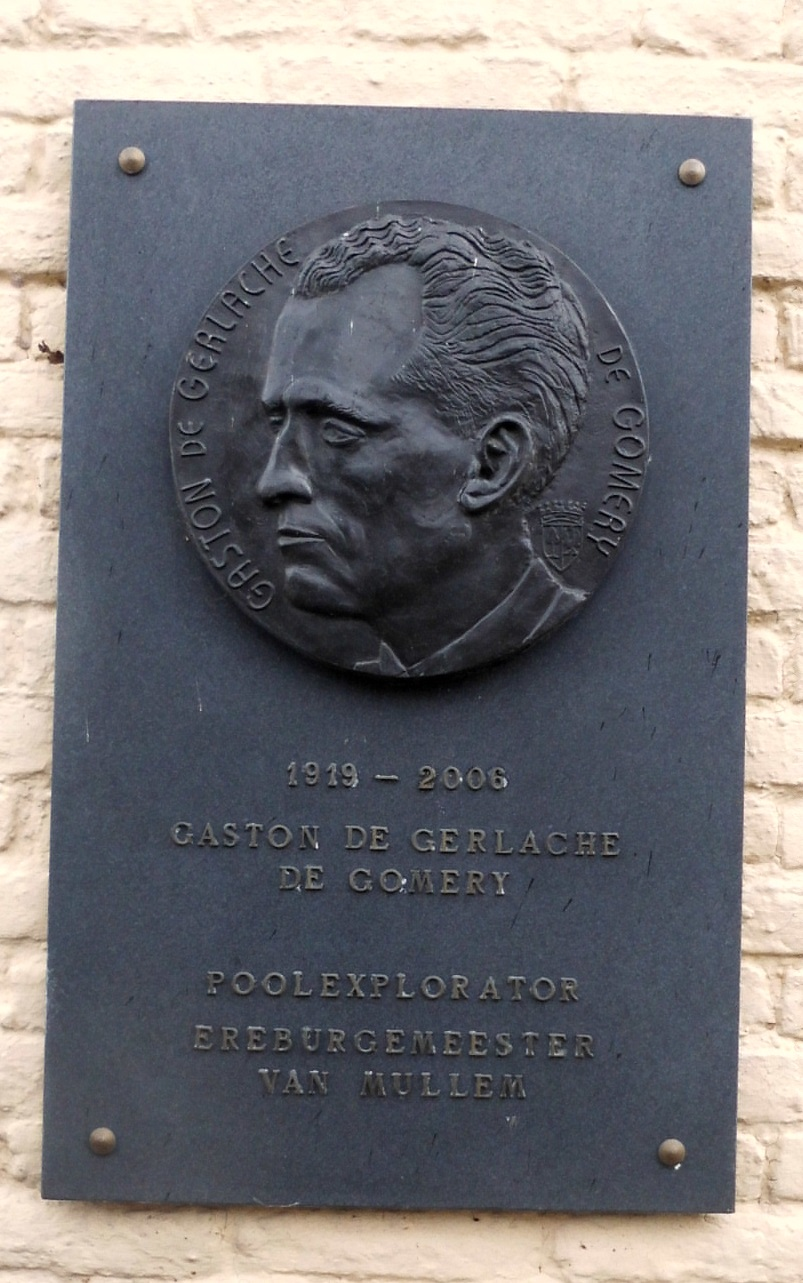 Gaston de Gerlache de Gomery (1919-2006) - voormalig burgemeester van Mullem - Oudenaarde - Oost-Vlaanderen - België